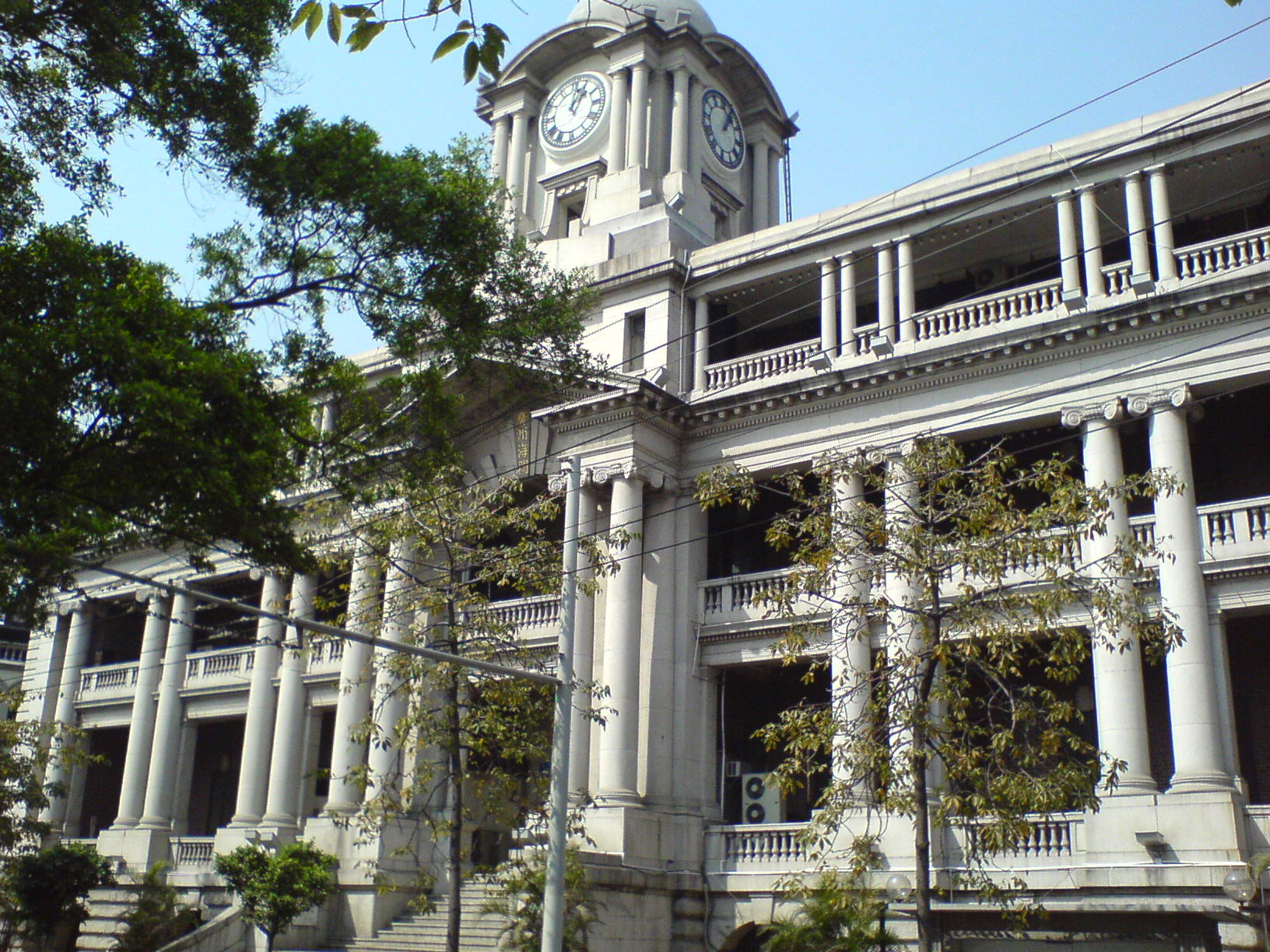 广州荔湾区沿江西路粤海关旧址